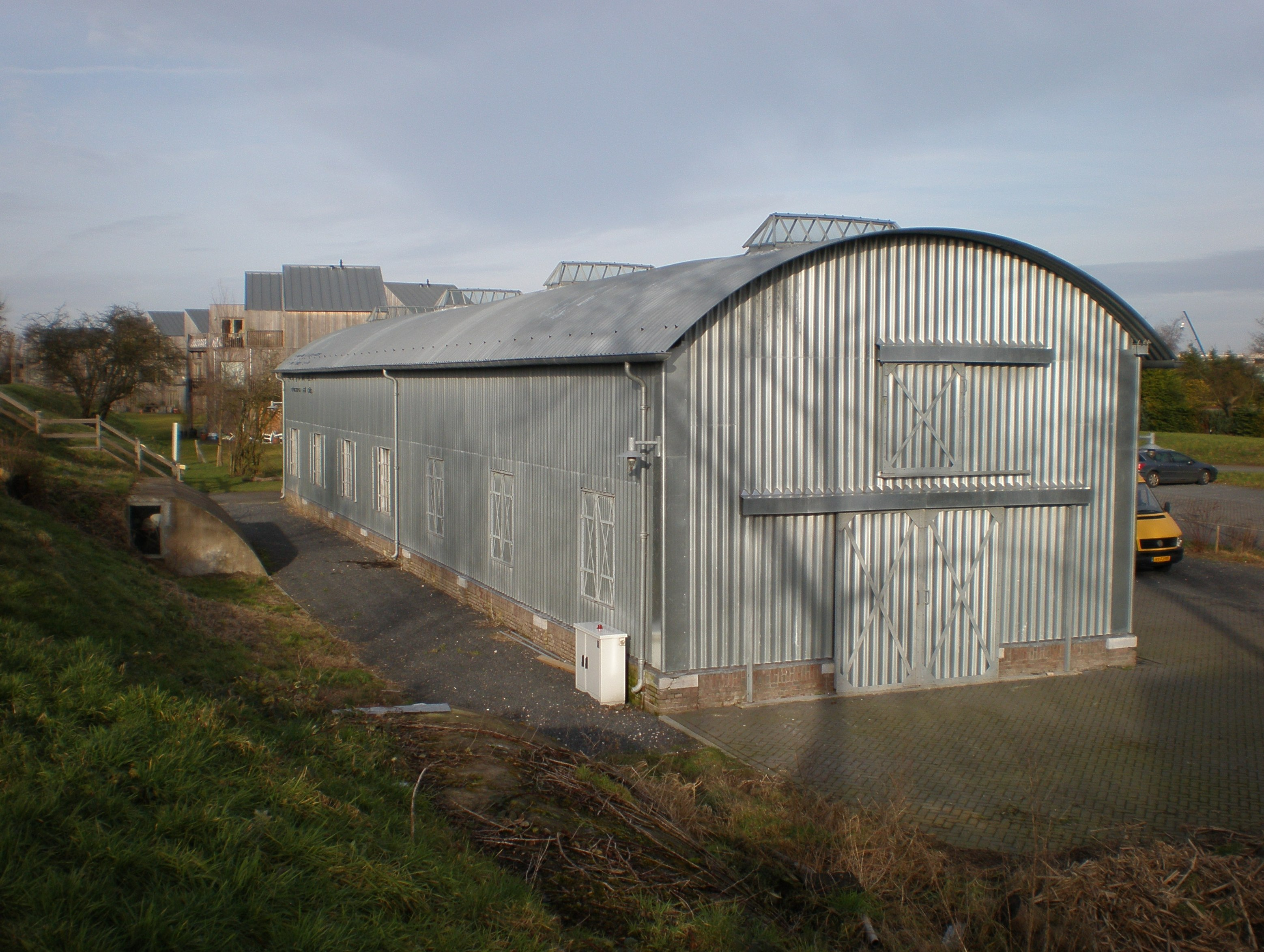 Stelling van Amsterdam: Fort bij Vijfhuizen, bergloods